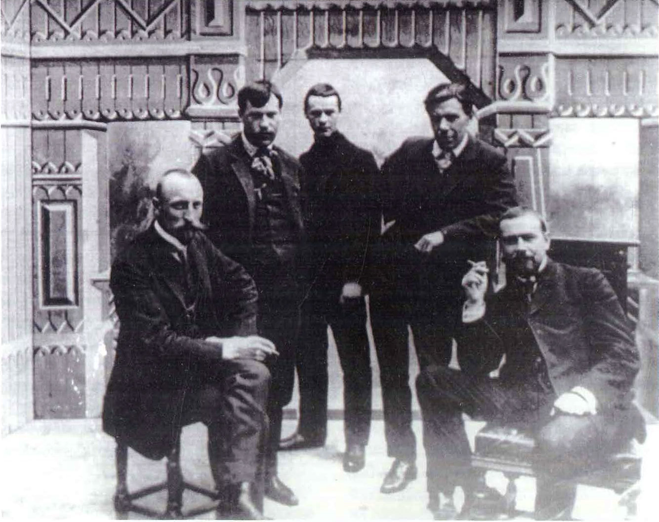 Владимир Сиверсен (слева), Пётр Чардынин (второй справа) и Александр Ханжонков (крайний справа) в павильоне студии Ханжонкова